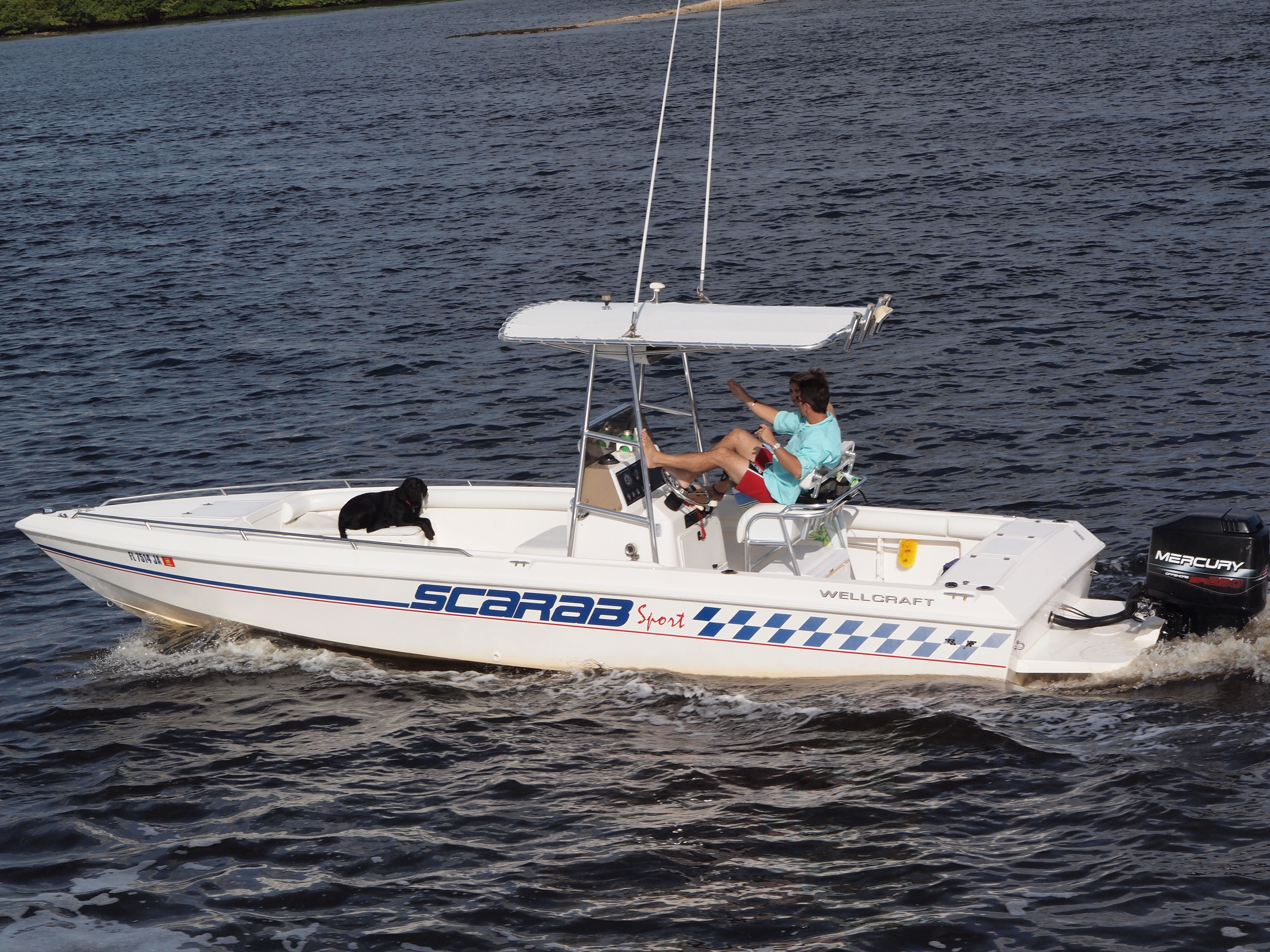 Wellcraft Scarab Sport